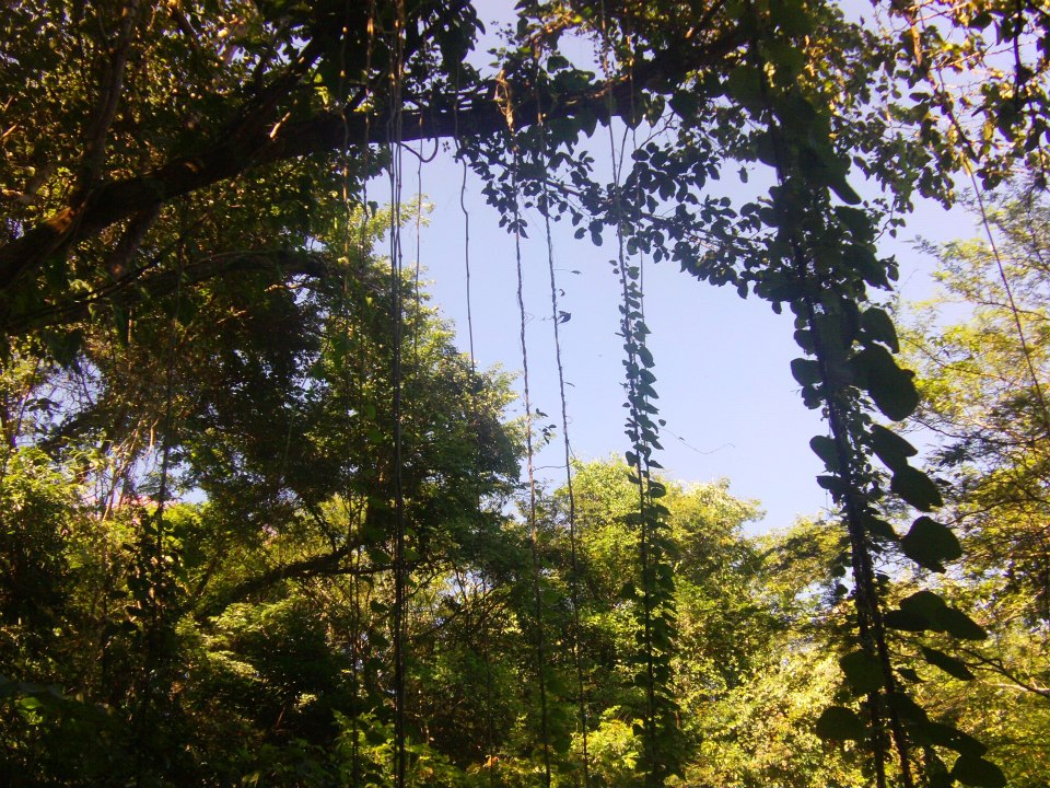 Centro montañoso.